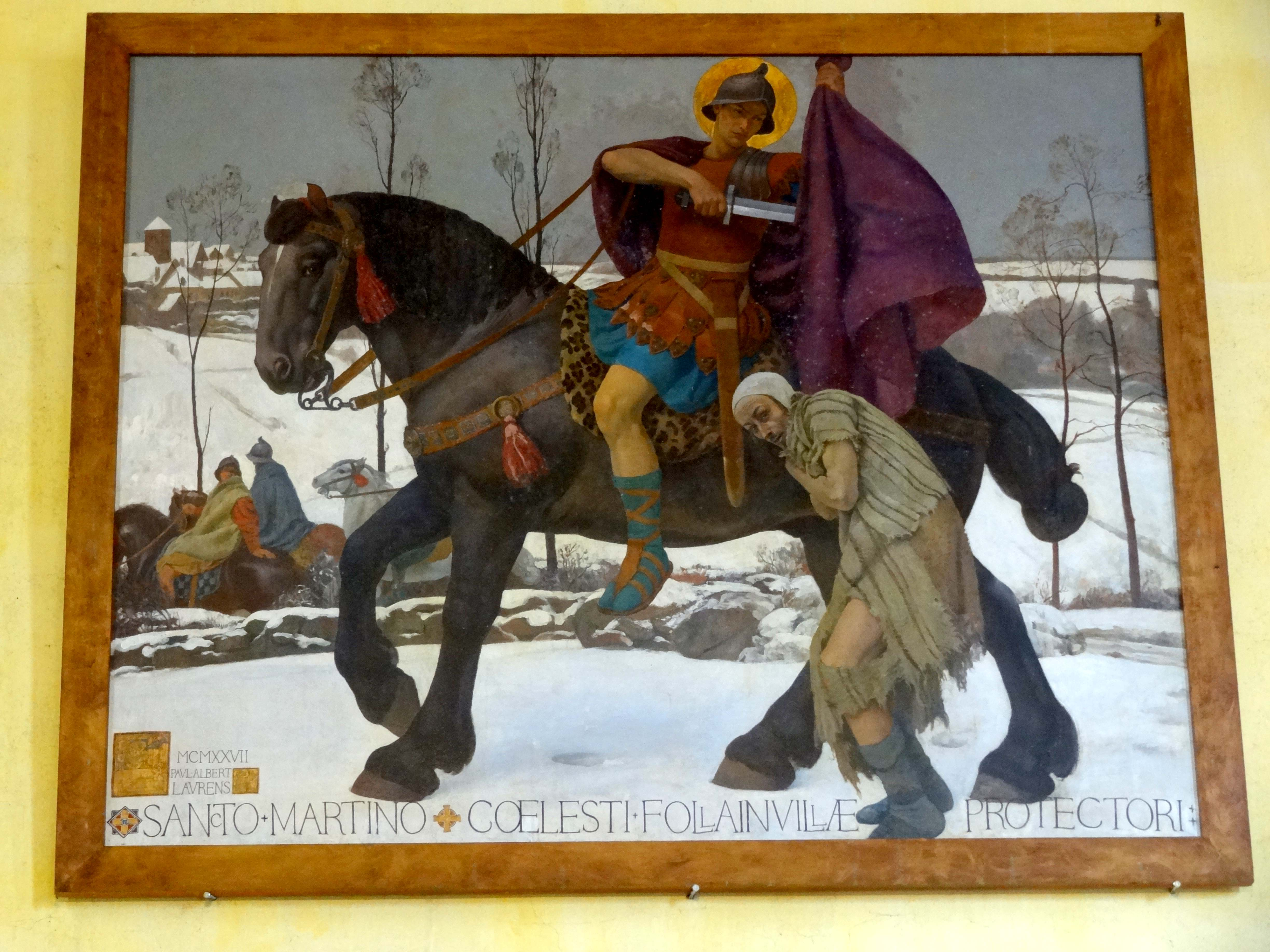 Tableau - la Charité de saint Martin, 1927. Ce tableau fut exposé en 1927 au Salon de la Société des Artistes français.